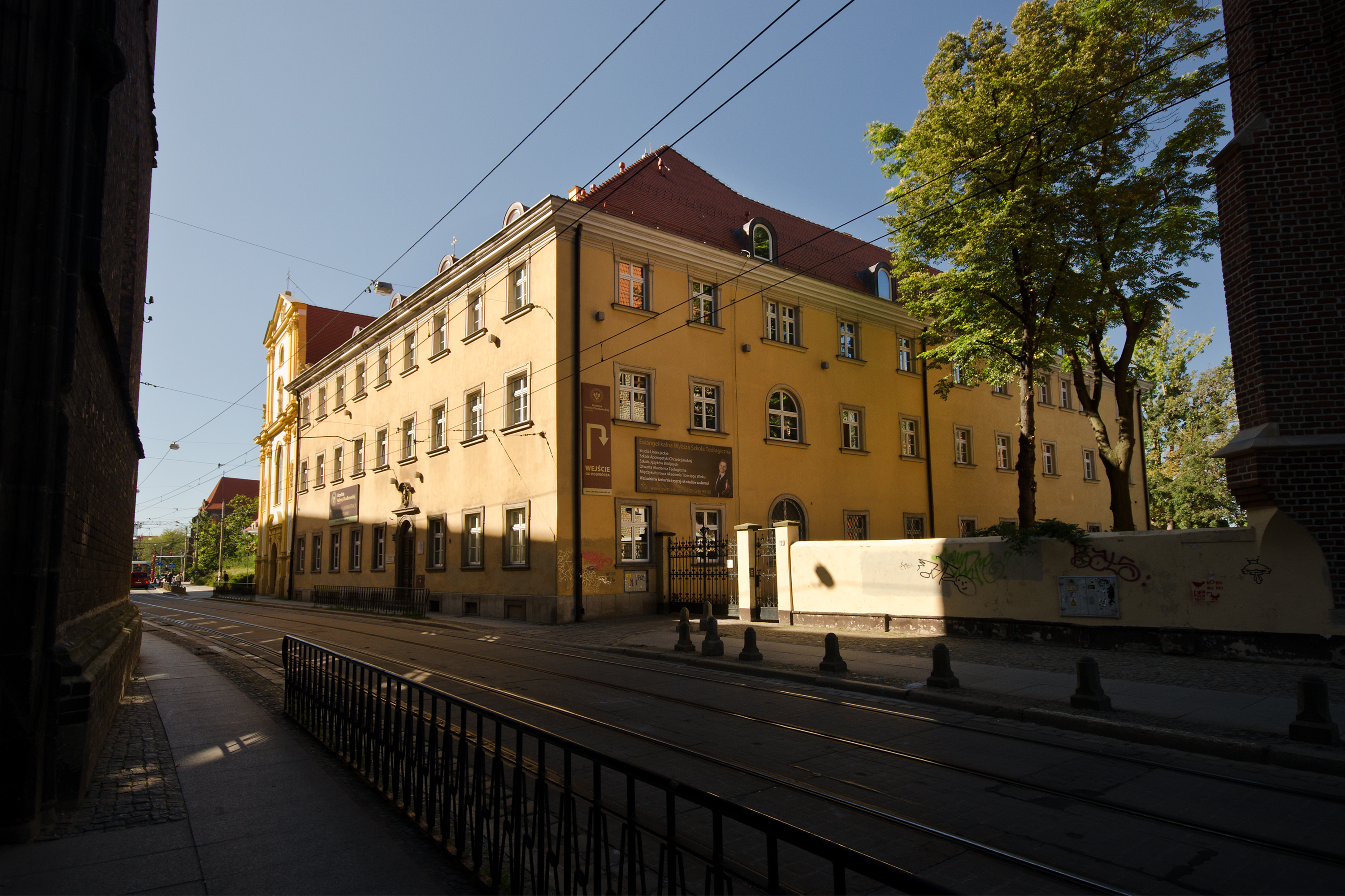 d. klasztor Augustianek, ob. budynek seminarium św. Jadwigi 12, Miasto Wrocław - Śródmieście